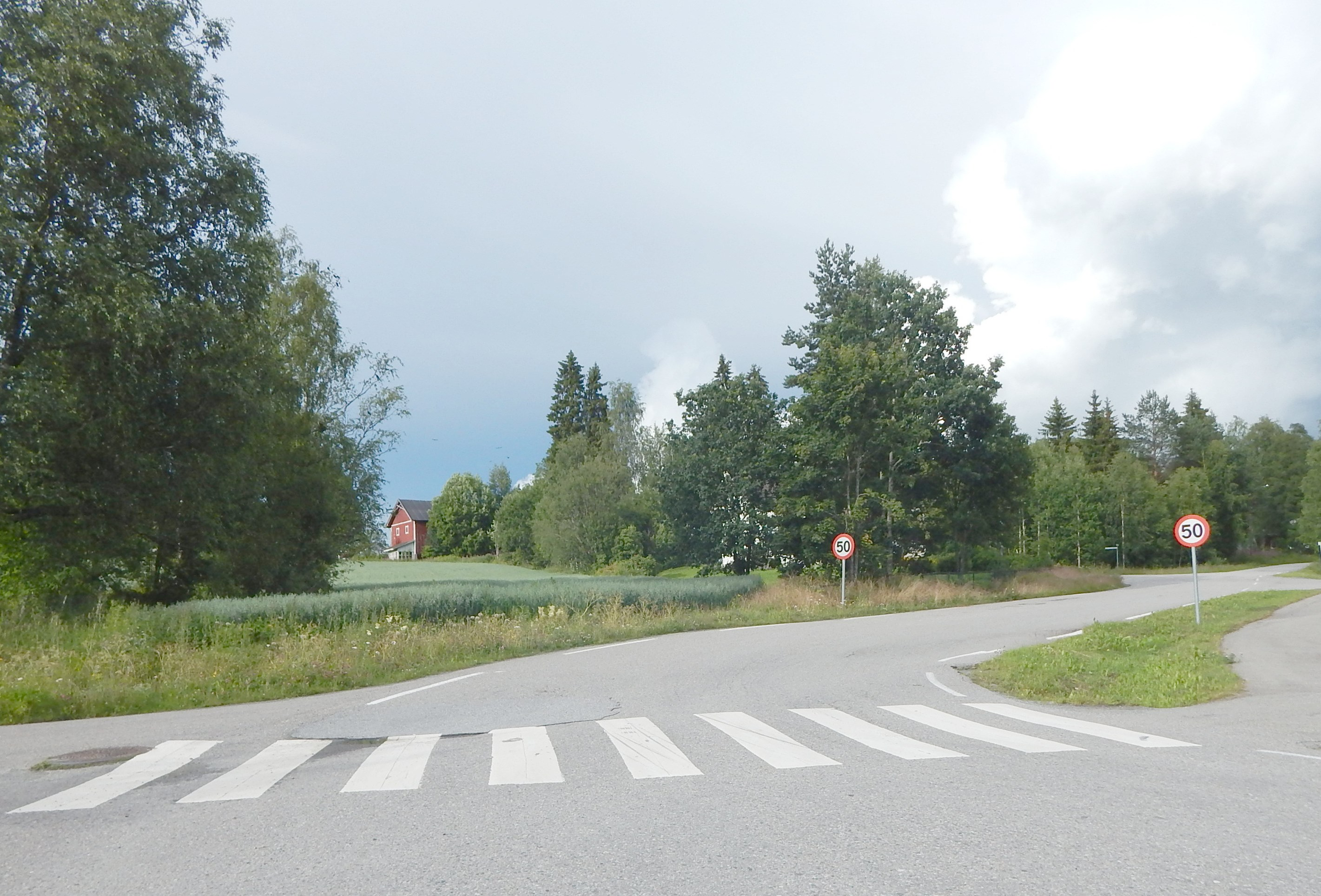 Svensrudvegen (fylkesvei 1980, tidl. 337) i krysset ved Grensevegen